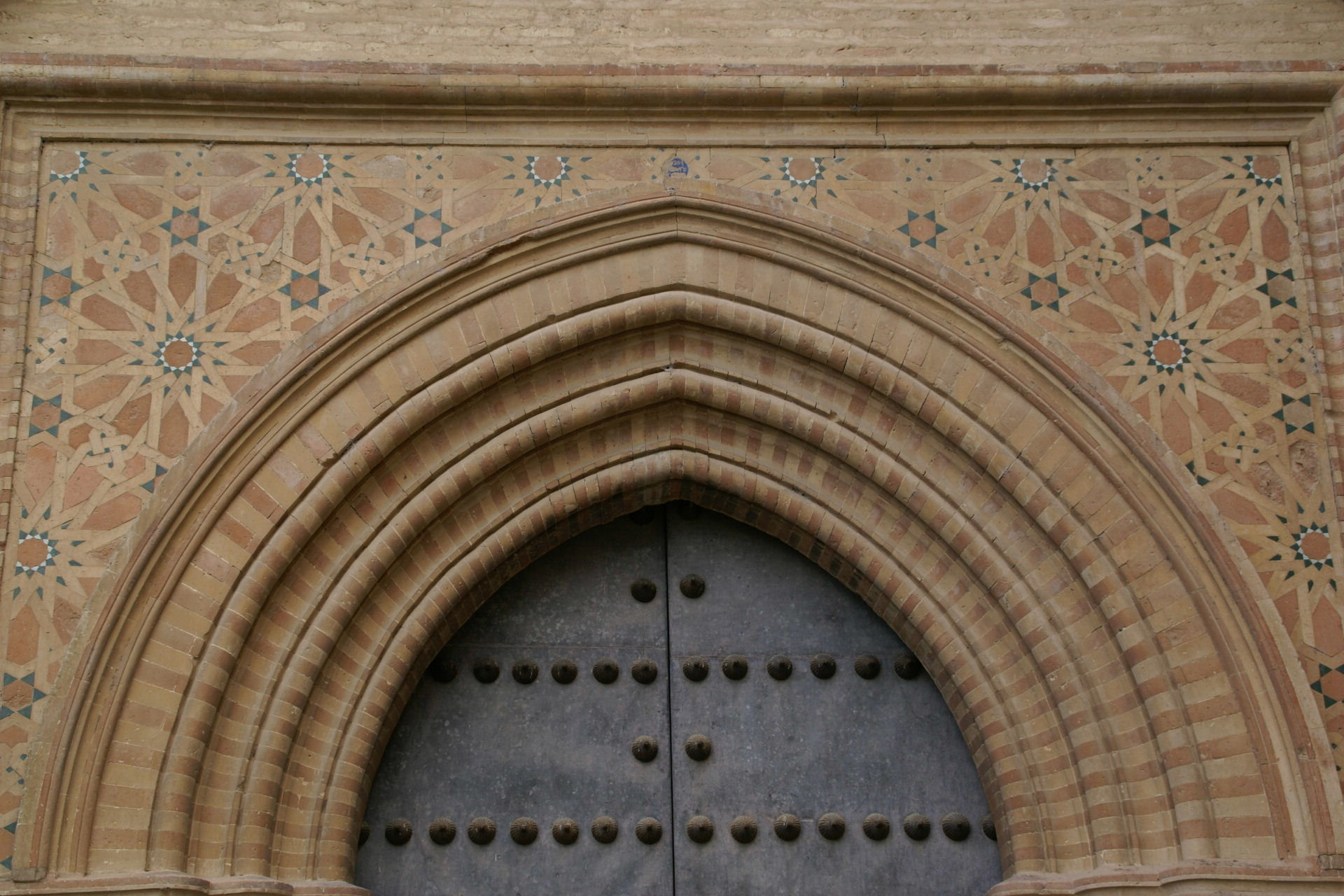 Monastery of San Isidoro del Campo, Santiponce (Seville) Spain